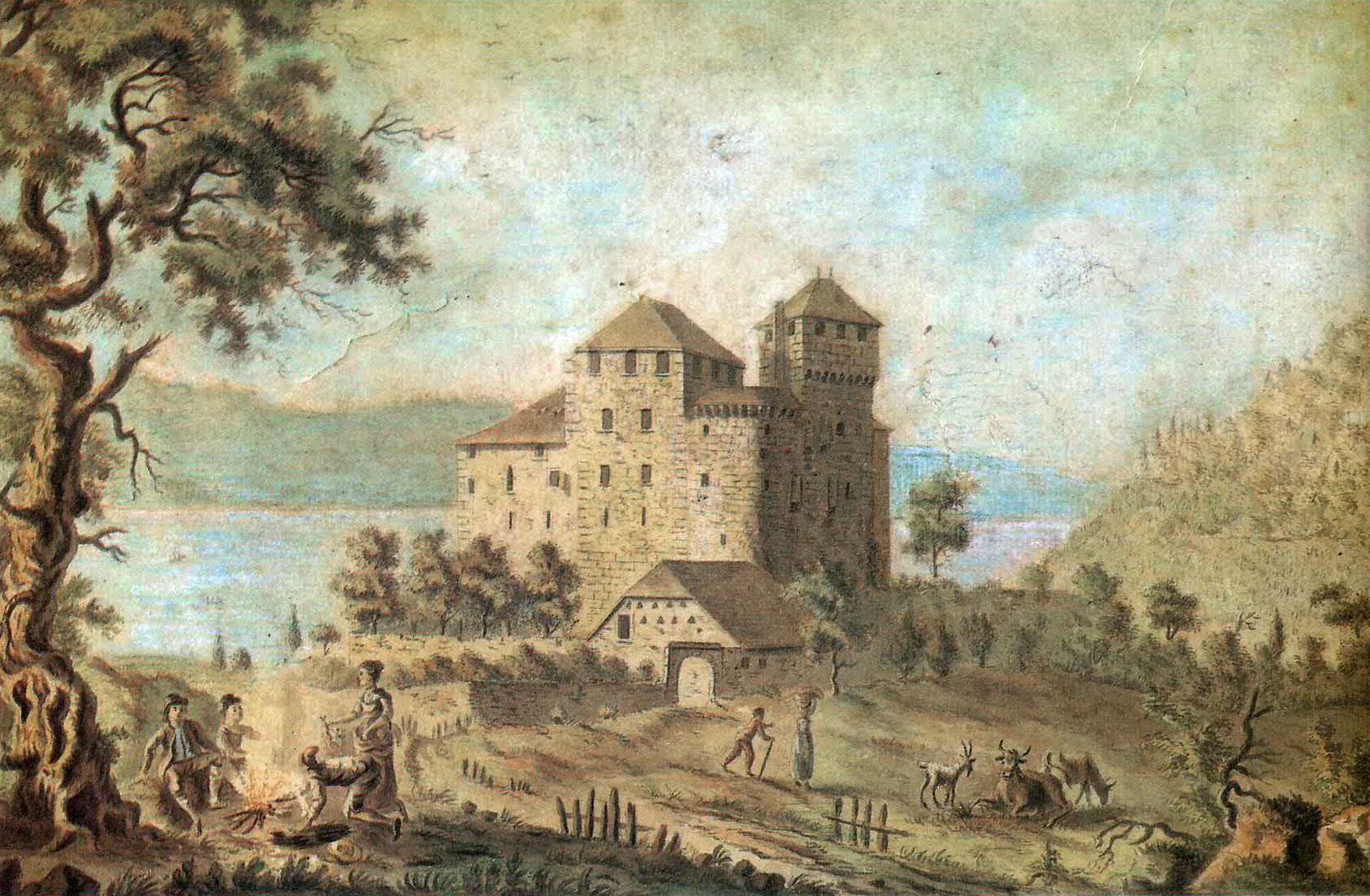 Gemälde der Burg Menthon-Saint-Bernard aus dem 19. Jahrhundert